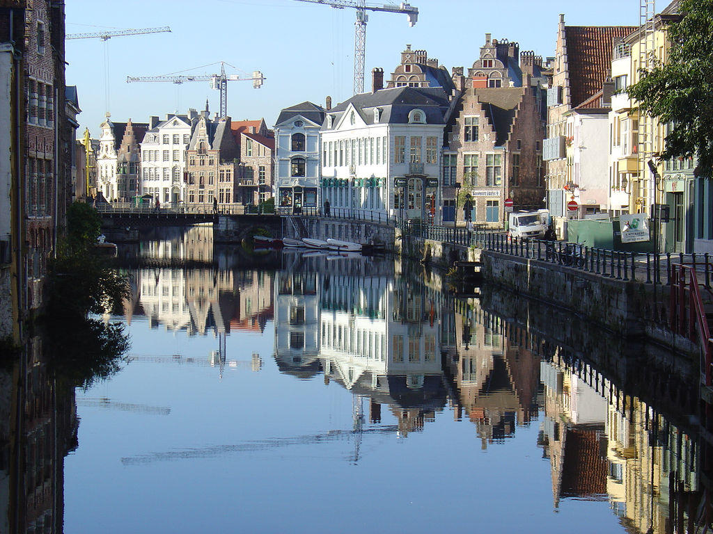 Channel, Gent, BelgioView over canal in Gent